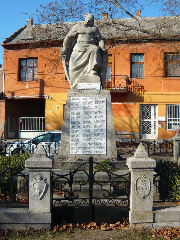 Statue of Prince Csaba in Budapest